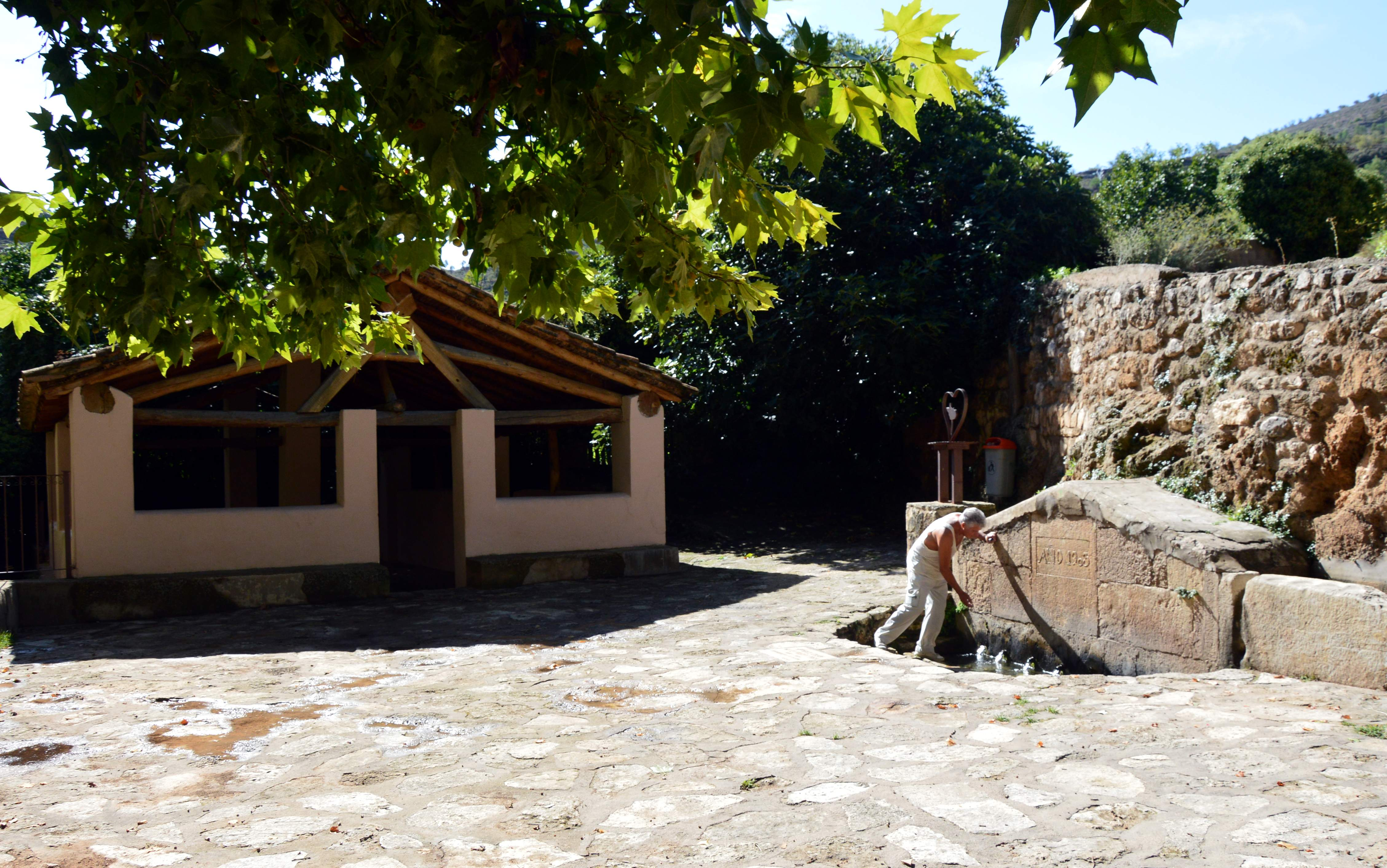 Vista general de la placeta de la Fuente Vieja, con la fuente abrevadero a la derecha y el lavadero público a la izquierda (2018).